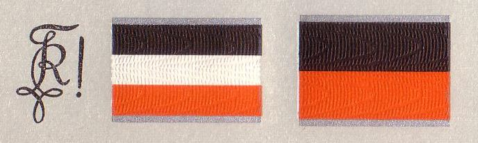 Zirkel, Corpsburschenband und Fuchsenband des Corps Rhenania Bern